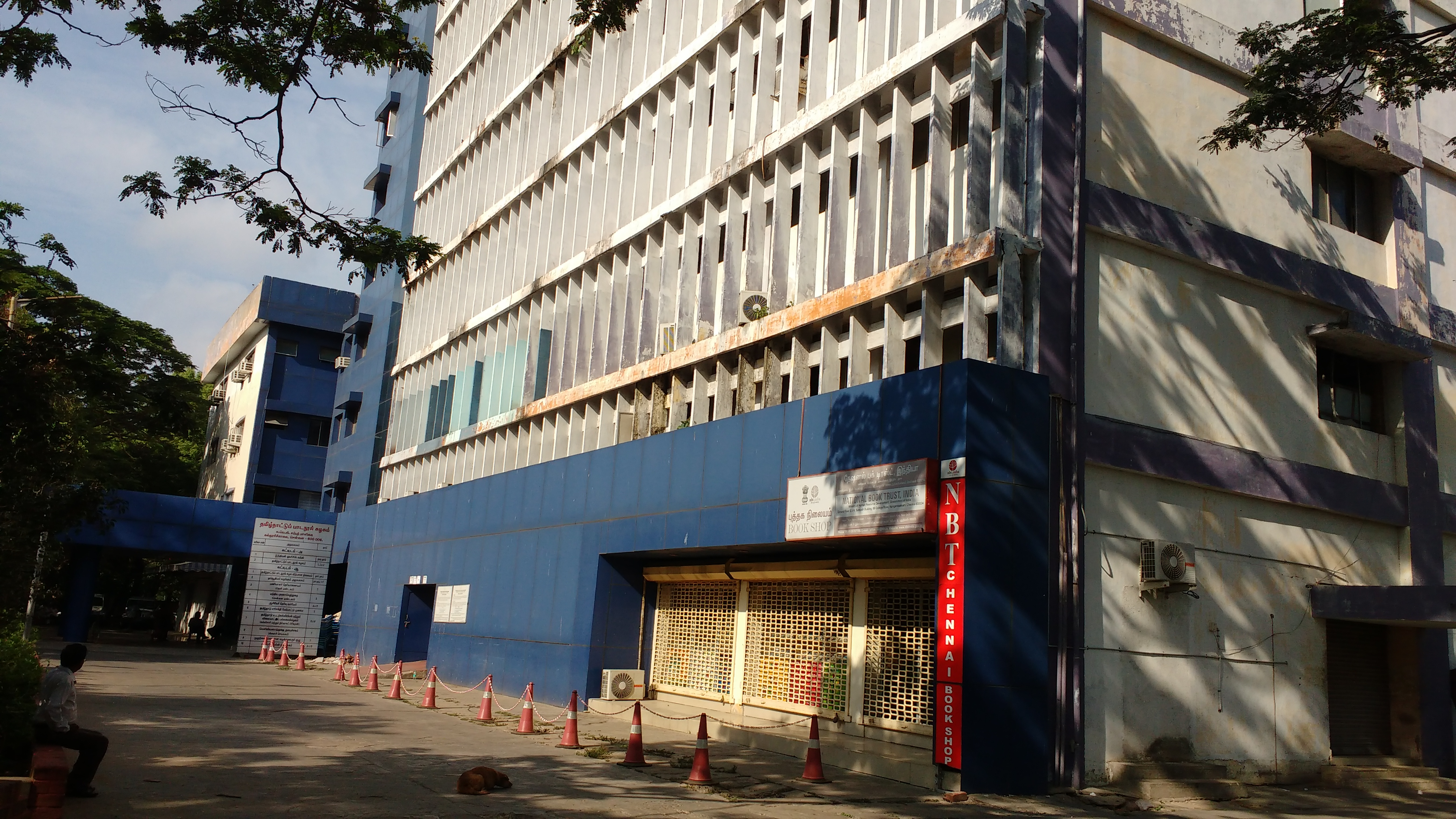 ஆசிரியர் தேர்வு வாரியம் சென்னை